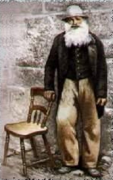 Pieter Groen (1808-1902)